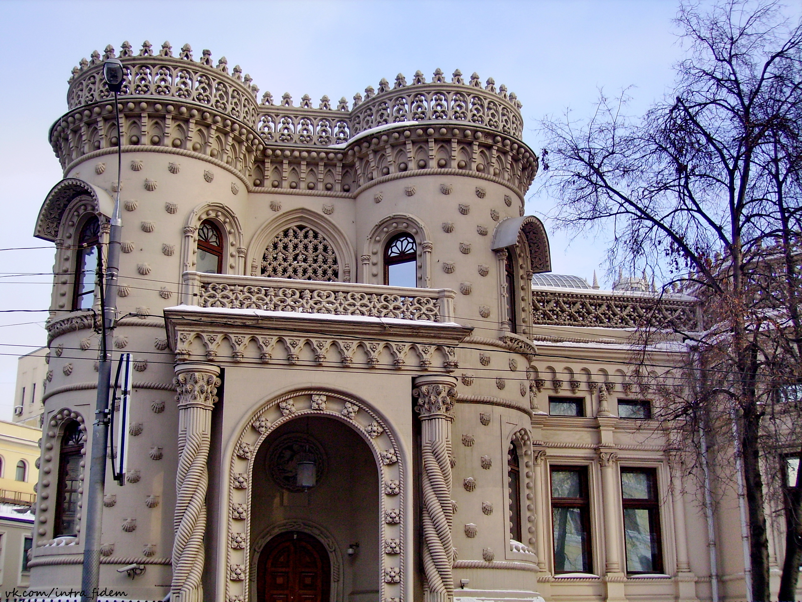 Усадьба Морозова А. А. (Москва и Московская область, Москва, Воздвиженка улица, 16)